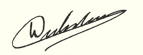 Signature d'Hubert Dubedout, maire de Grenoble de 1965 à 1983 et député de l'Isère de 1973 à 1983.